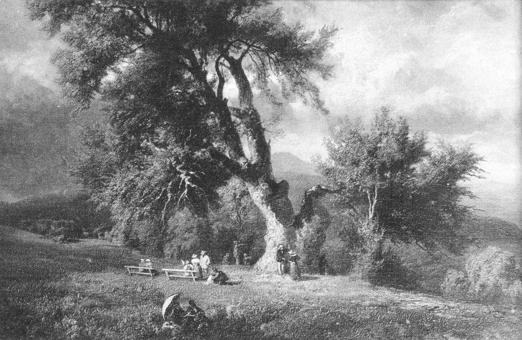 Keleti Gusztáv festménye: A Normafa